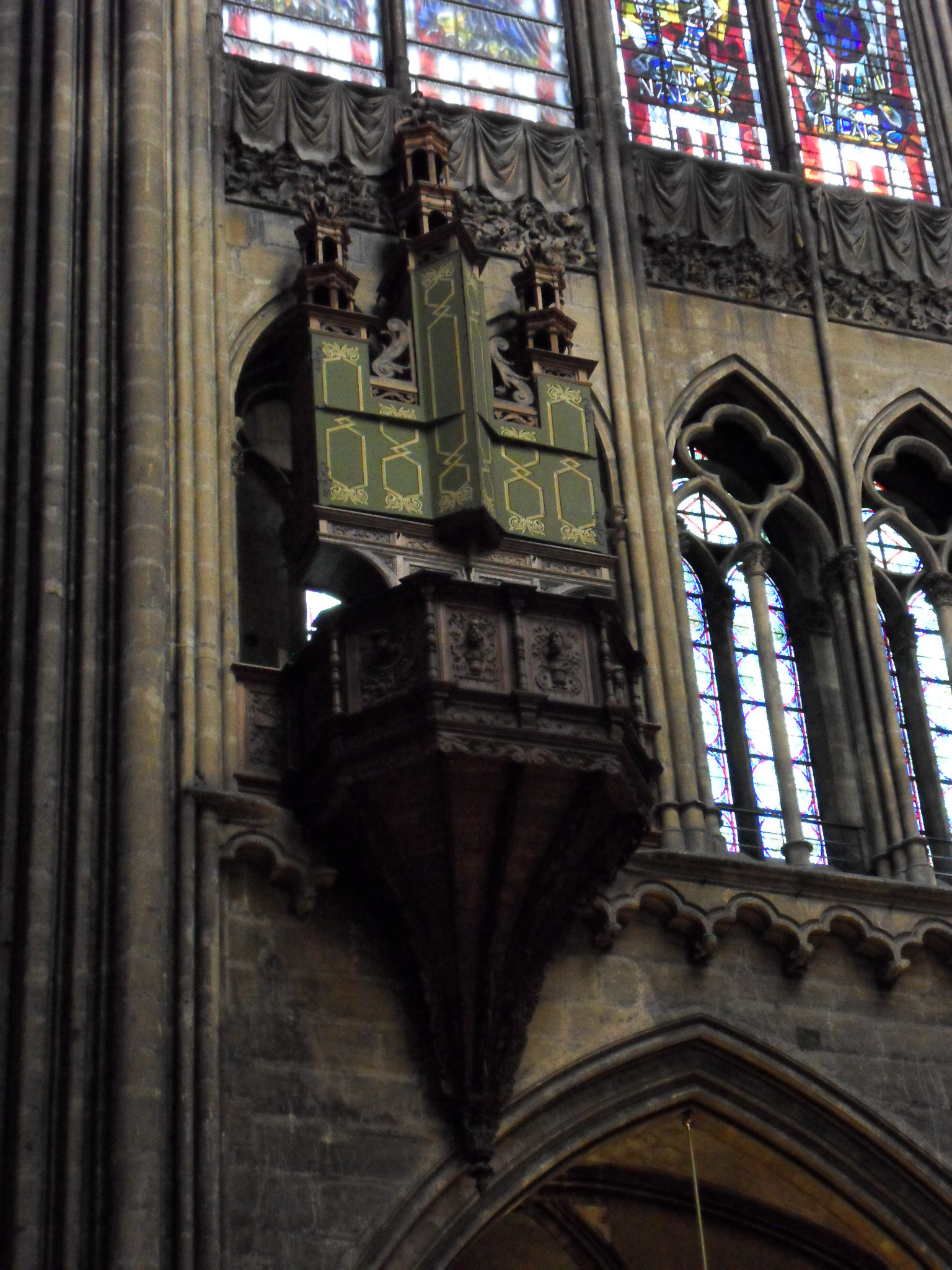 Cathédrale Saint-Étienne à Metz (France), orgue Renaissance en nid d'hirondelle du triforium, présentant la particularité de posséder des panneaux en bois peint refermables.